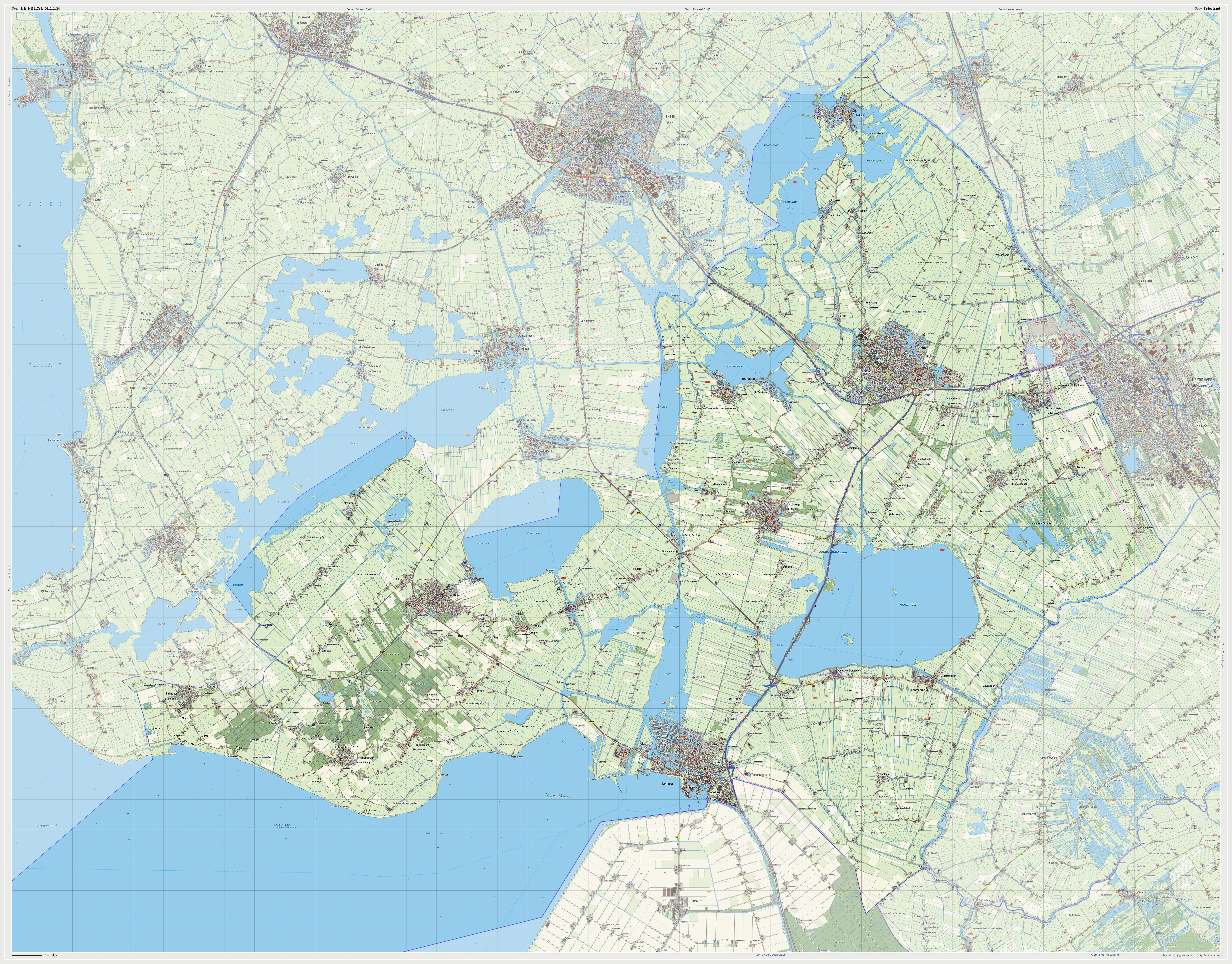 Topografische kaart van gemeente De Friese Meren (2013). Samengesteld door Jan-Willem van Aalst op basis van de GML open geodata van de BRT/Top10NL (basisregistratie Topografie, Kadaster 2011), vrijgegeven door Kadaster onder de Creative Commons BY licentie. Additionele gegevens uit BAG (8 juli 2013), uit de Open Street Map (9 juli 2013) en uit de Risicokaart. Peildatum kaartbeeld: 9 juli 2013. Zie ook Gemeentenatlas.nl Samenstelling en kleurenschema: Jan-Willem van Aalst, met QuantumGIS en Photoshop. Zie ook de Legenda.